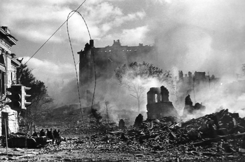 підірваний Дім Гінзбурга - перший хмарочос України